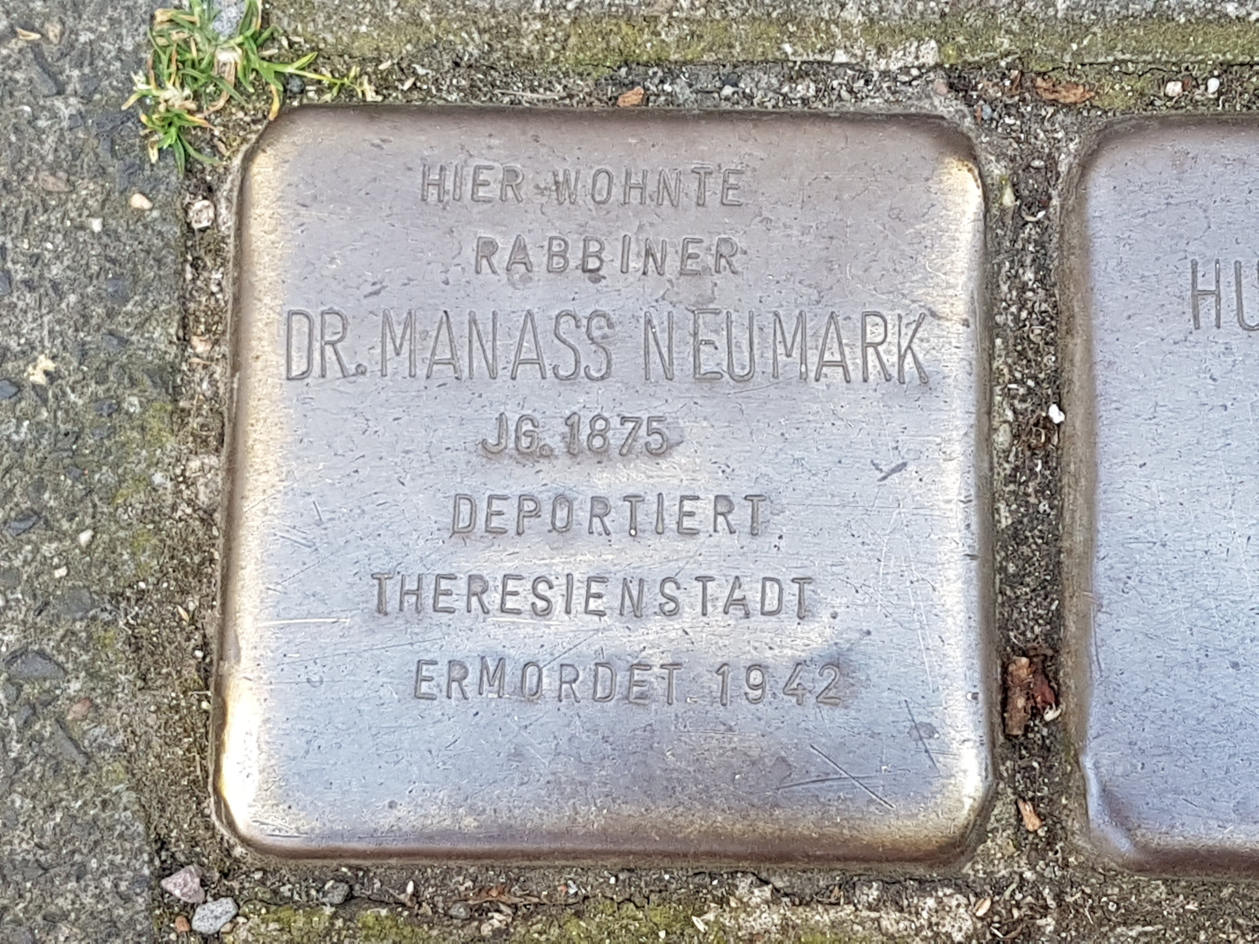 Stolperstein Duisburg